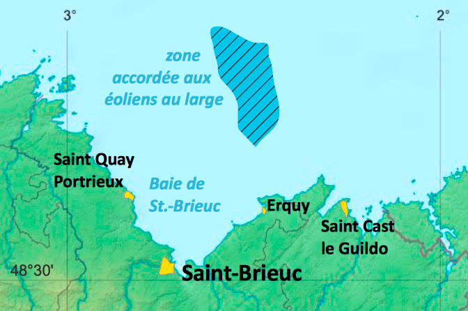 Implantation d'éoliens au large de Saint Brieuc - localisation.